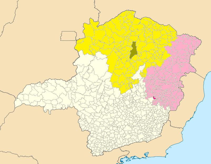 Cobertura da Rede InterTV em Minas Gerais